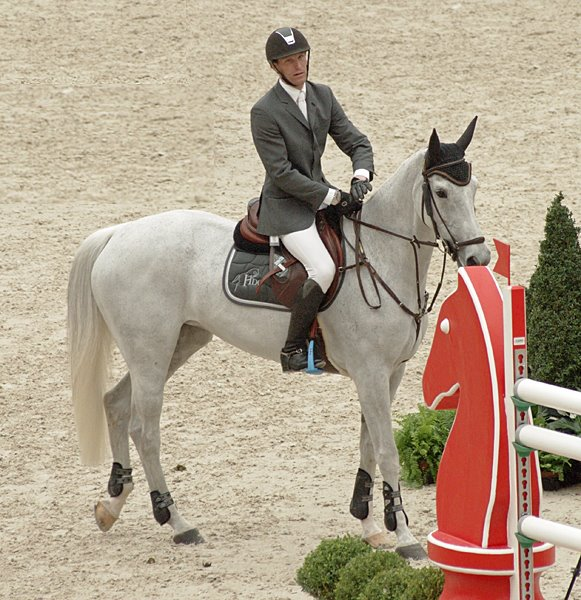 Kevin Staut et Silvana*HDC lors de l'édition 2012 du Saut Hermès, à Paris.